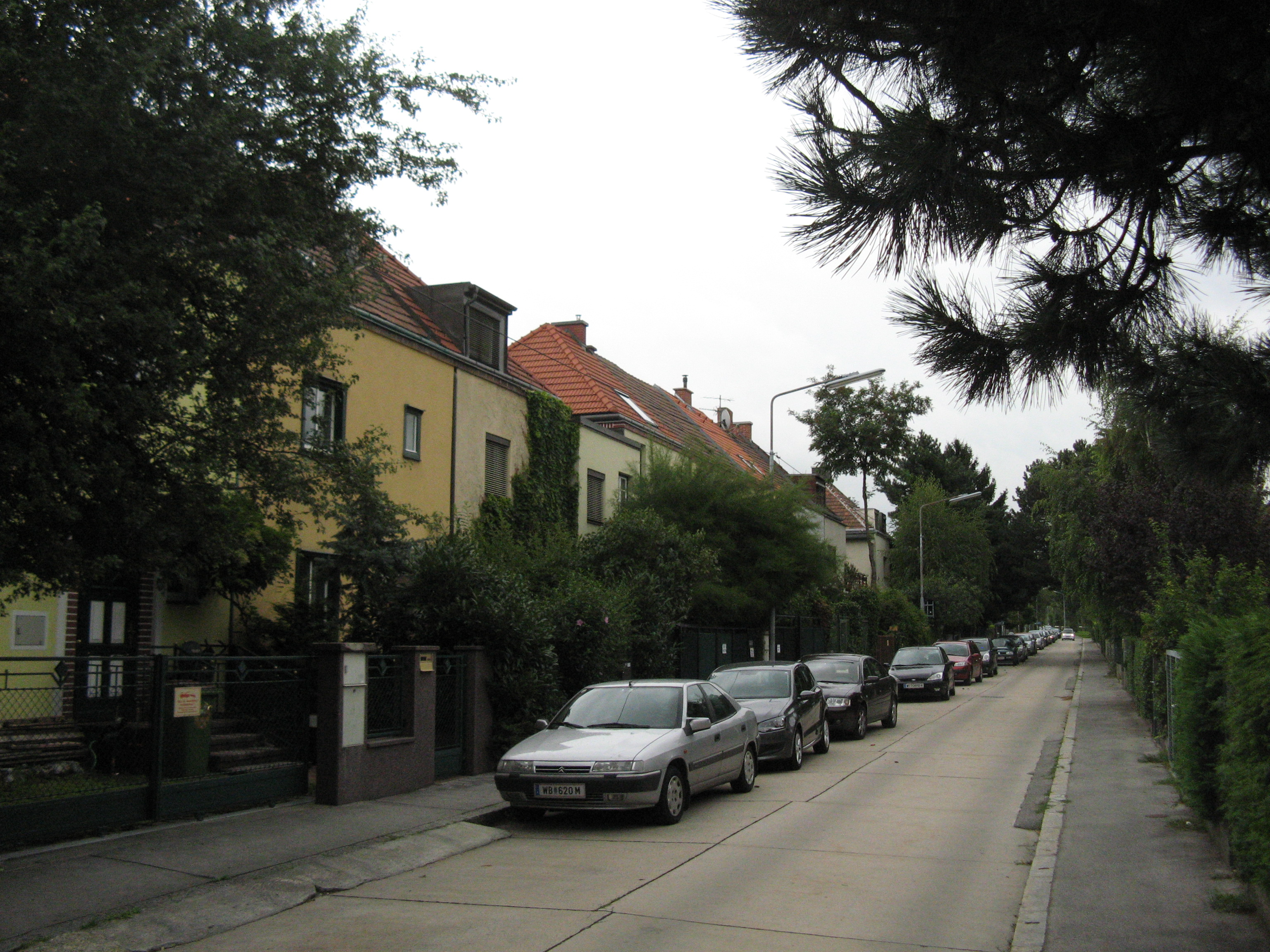 Siedlung Am Wasserturm (1923-1924) von Franz Schuster und Franz Schacherl, Raxstraße 29-111, Wien-Favoriten